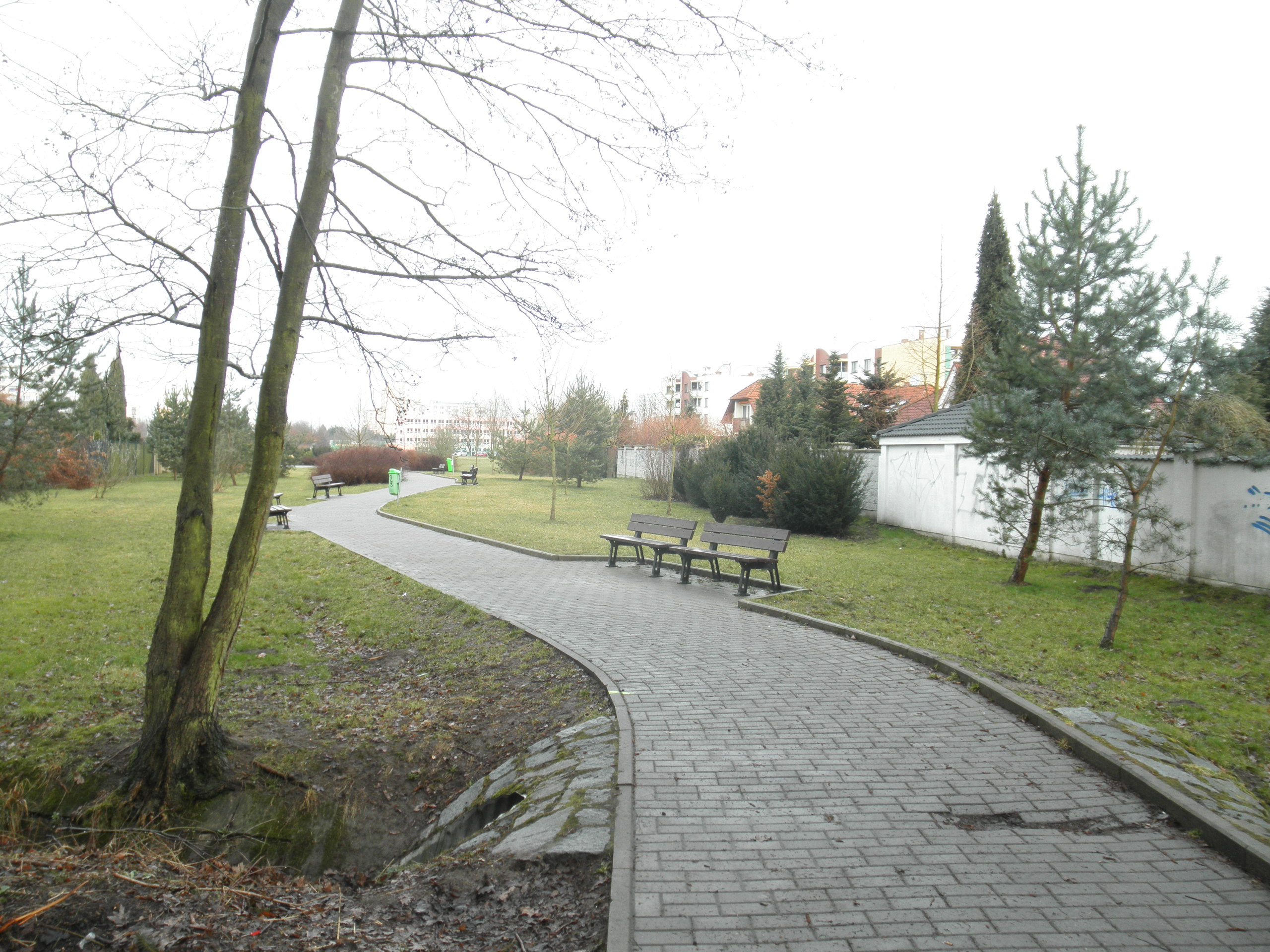 sídliště Dubina